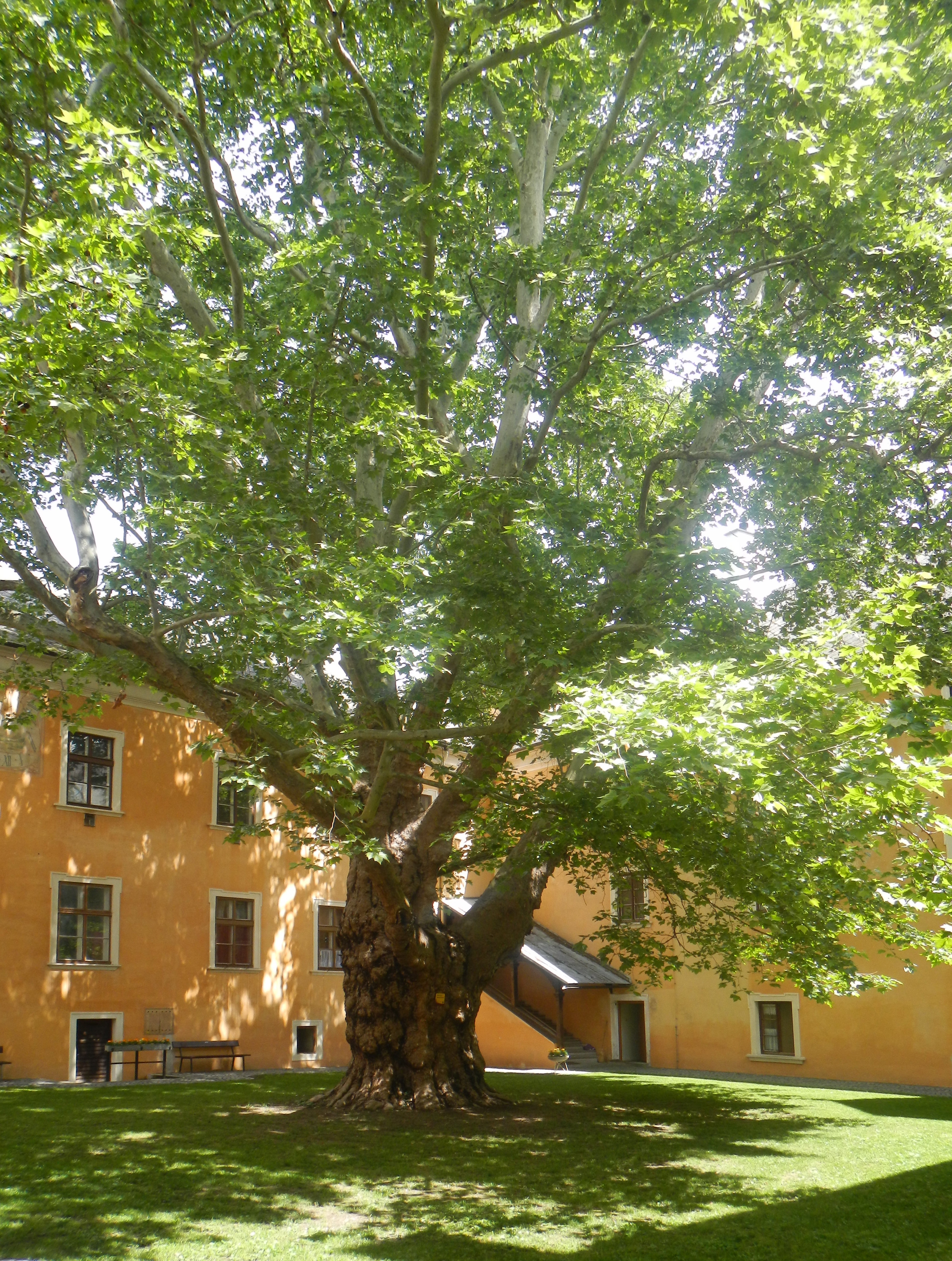 Platane im Innenhof von Schloss Mautern This media shows the natural monument in Lower Austria with the ID KR-049.